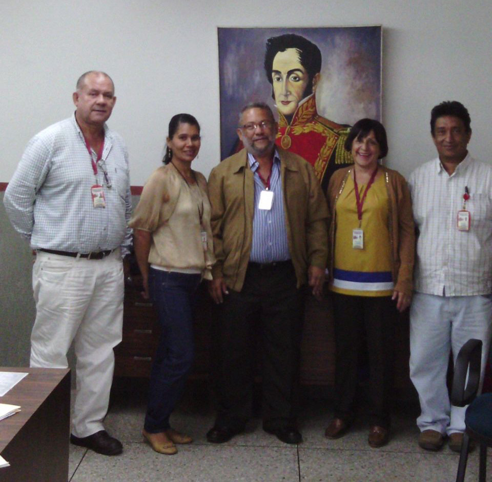 Nueva directiva universitaria.